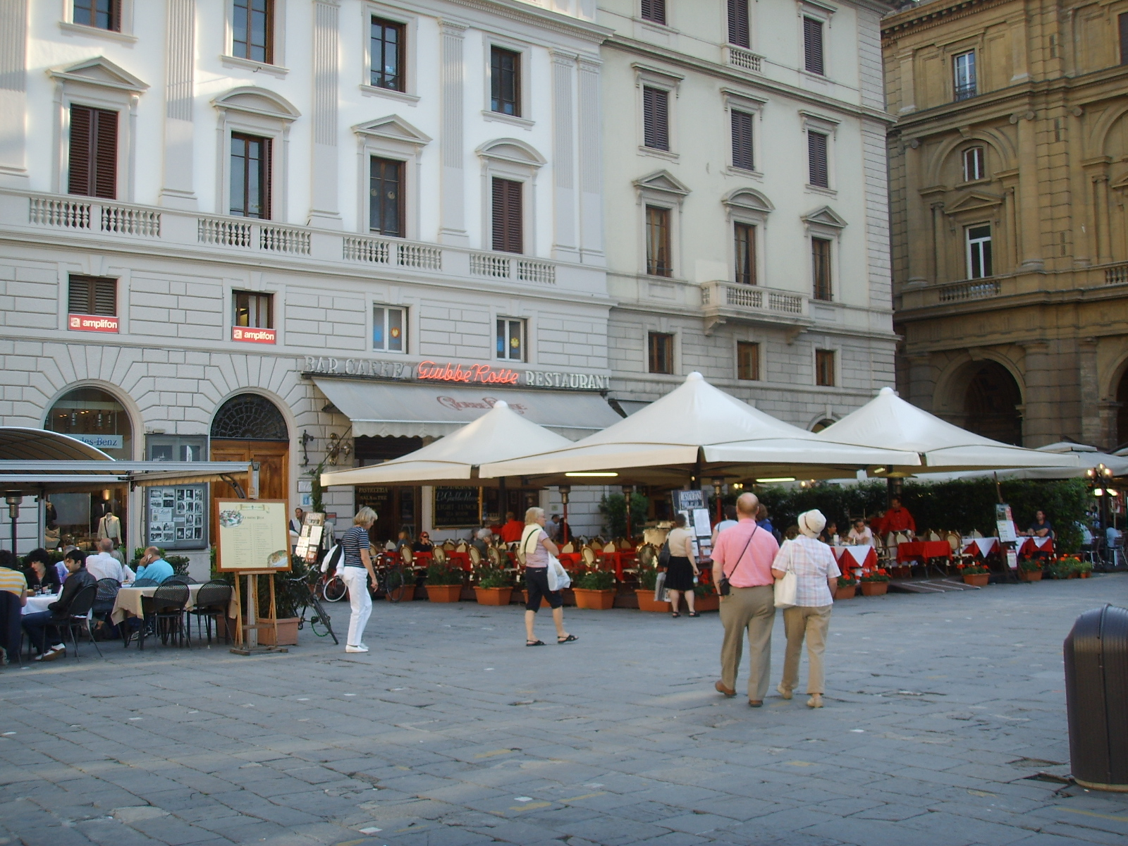 Caffé giubbe rosse